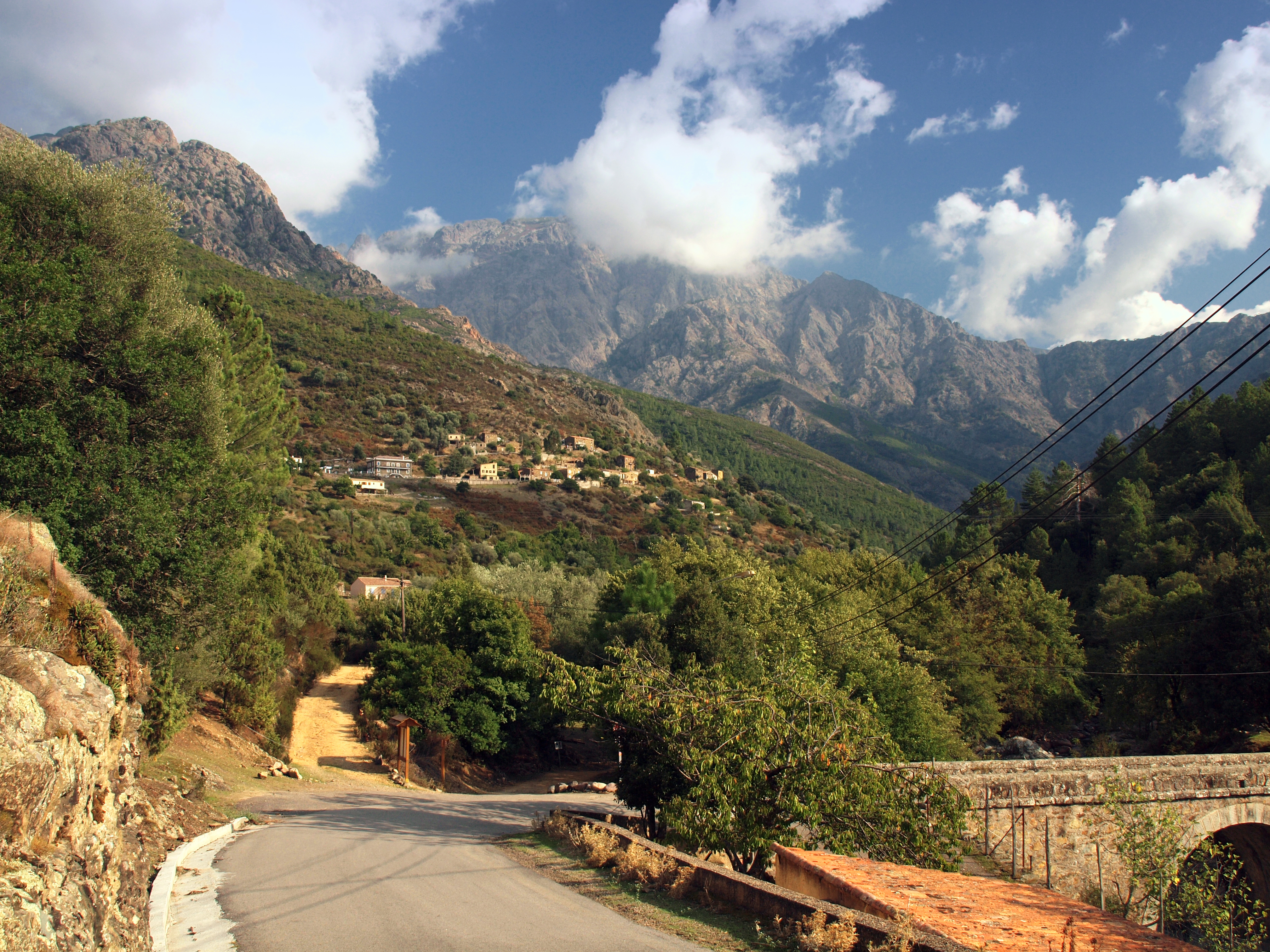 Manso - Hameau de Montestremu (276m)